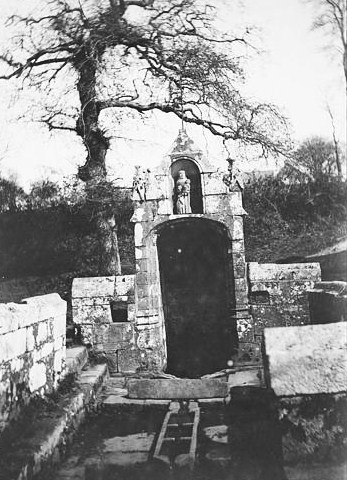 Fontaine de dévotion Notre-Dame-des-Fontaines près de Daoulas en 1893 (photo de Paul Lancrenon, Ministère de la Culture (France) - Médiathèque de l'architecture et du patrimoine)